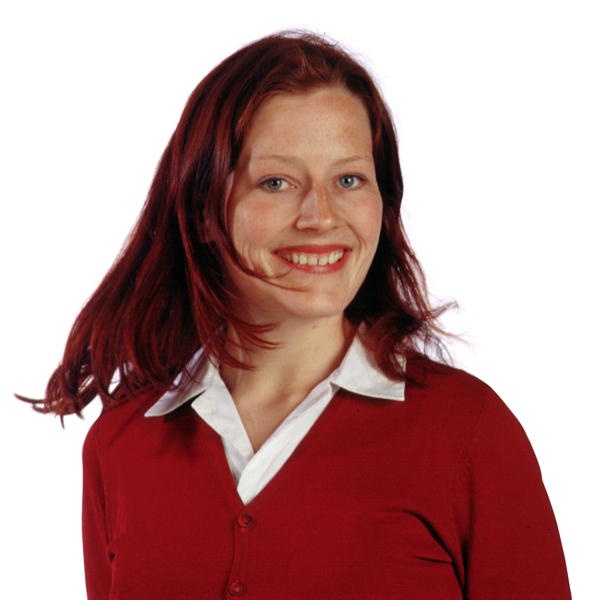 Synnøve Konglevoll, Ap-politiker.